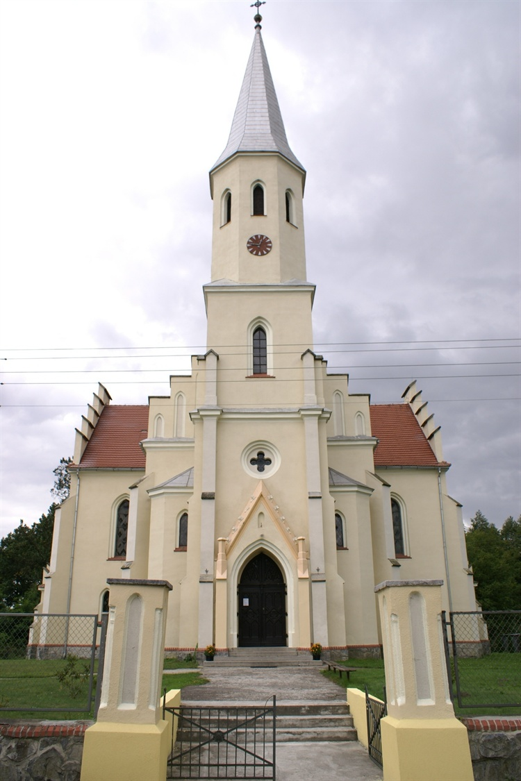 Kościół w Sarbach